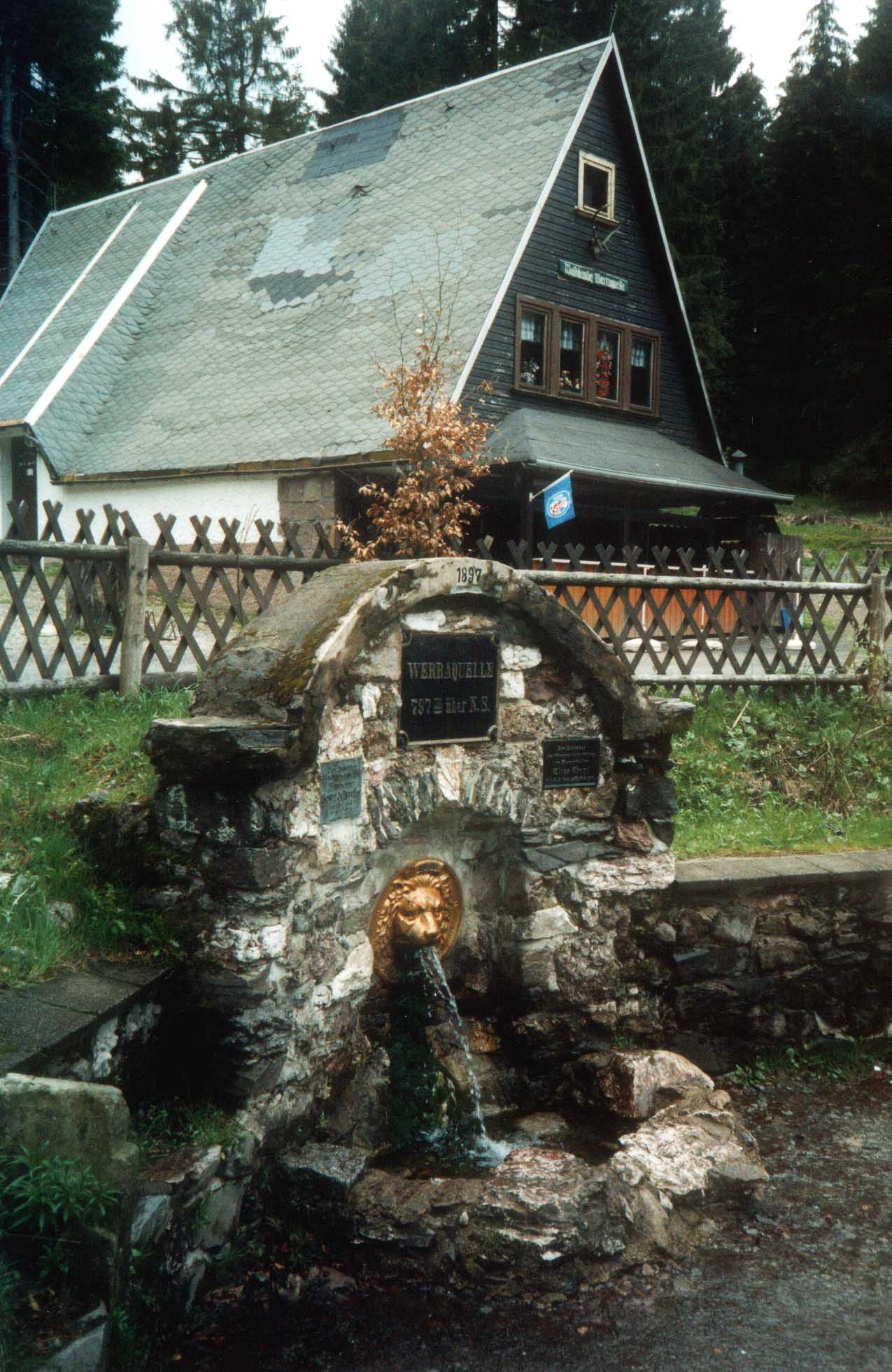 Eine der beiden Werraquellen